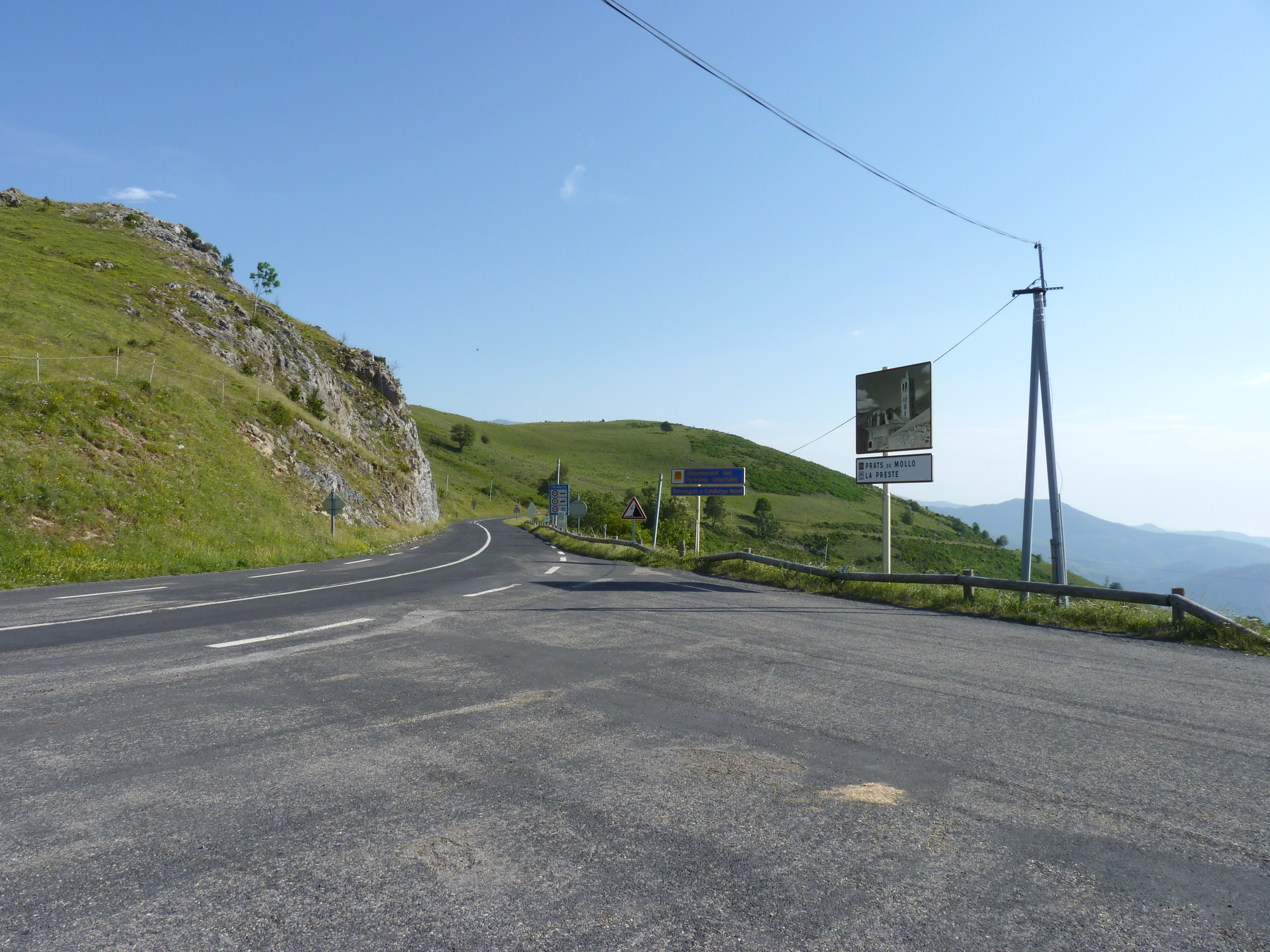 Col d'Ares côté français, Prats-de-Mollo-La-Preste (Pyrénées-Orientales, Languedoc-Roussillon, France)